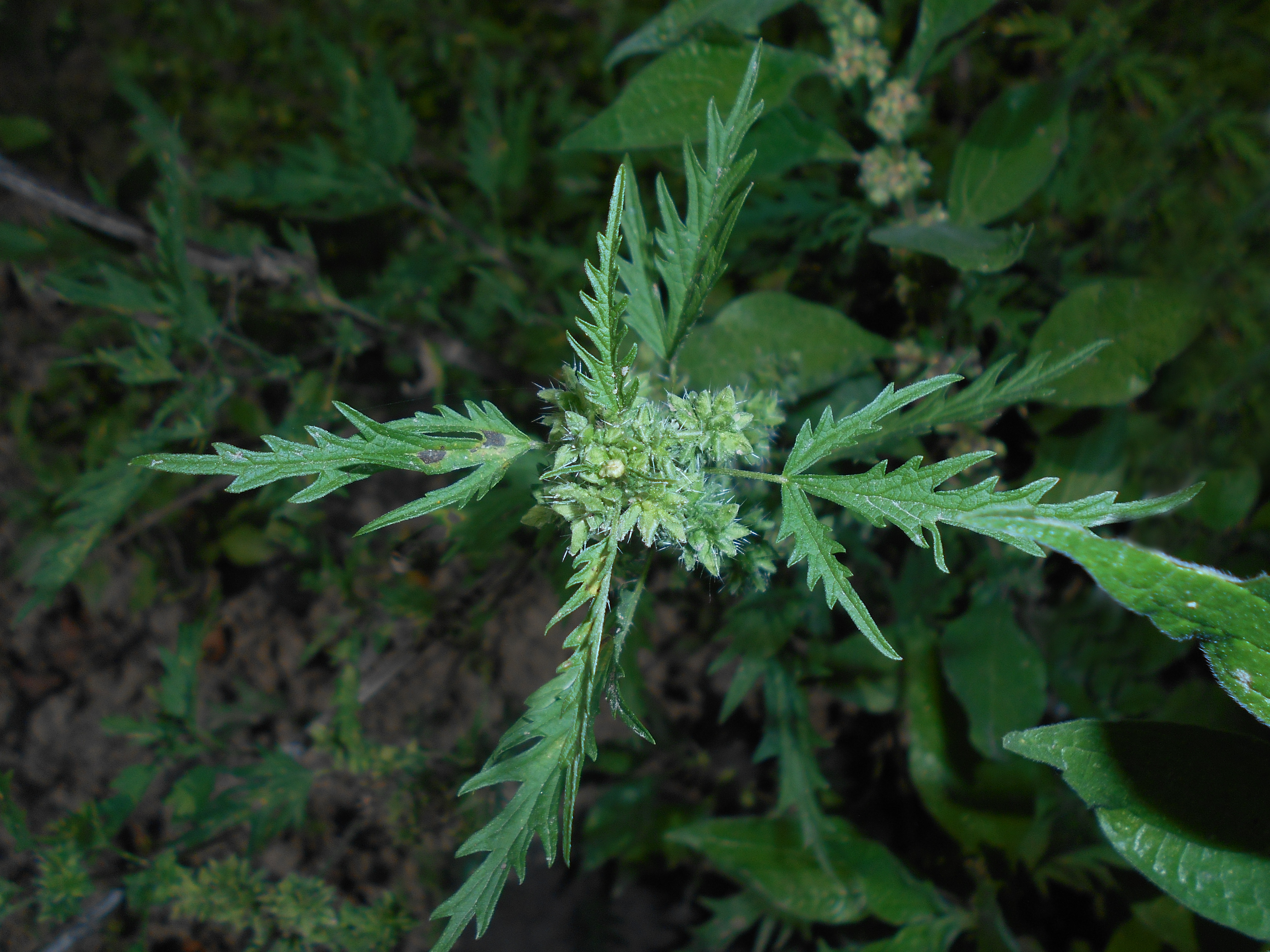 Pokrzywa konopiolistna (Urtica cannabina), Ogród Botaniczny UMCS w Lublinie.